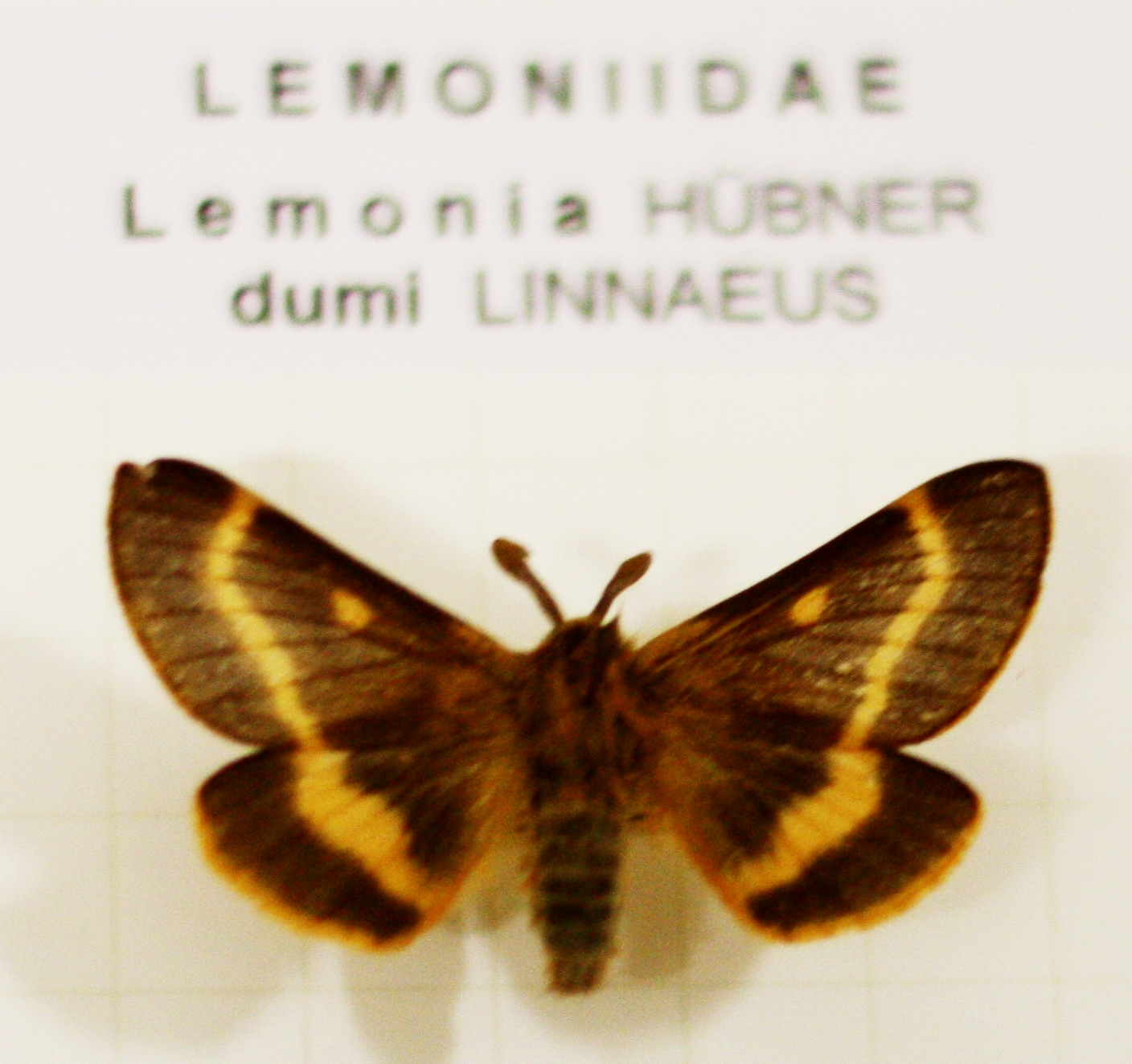 Naturkundliche Sammlung Übermaxx Überseenuseum Bremen; Schmetterlinge und andere